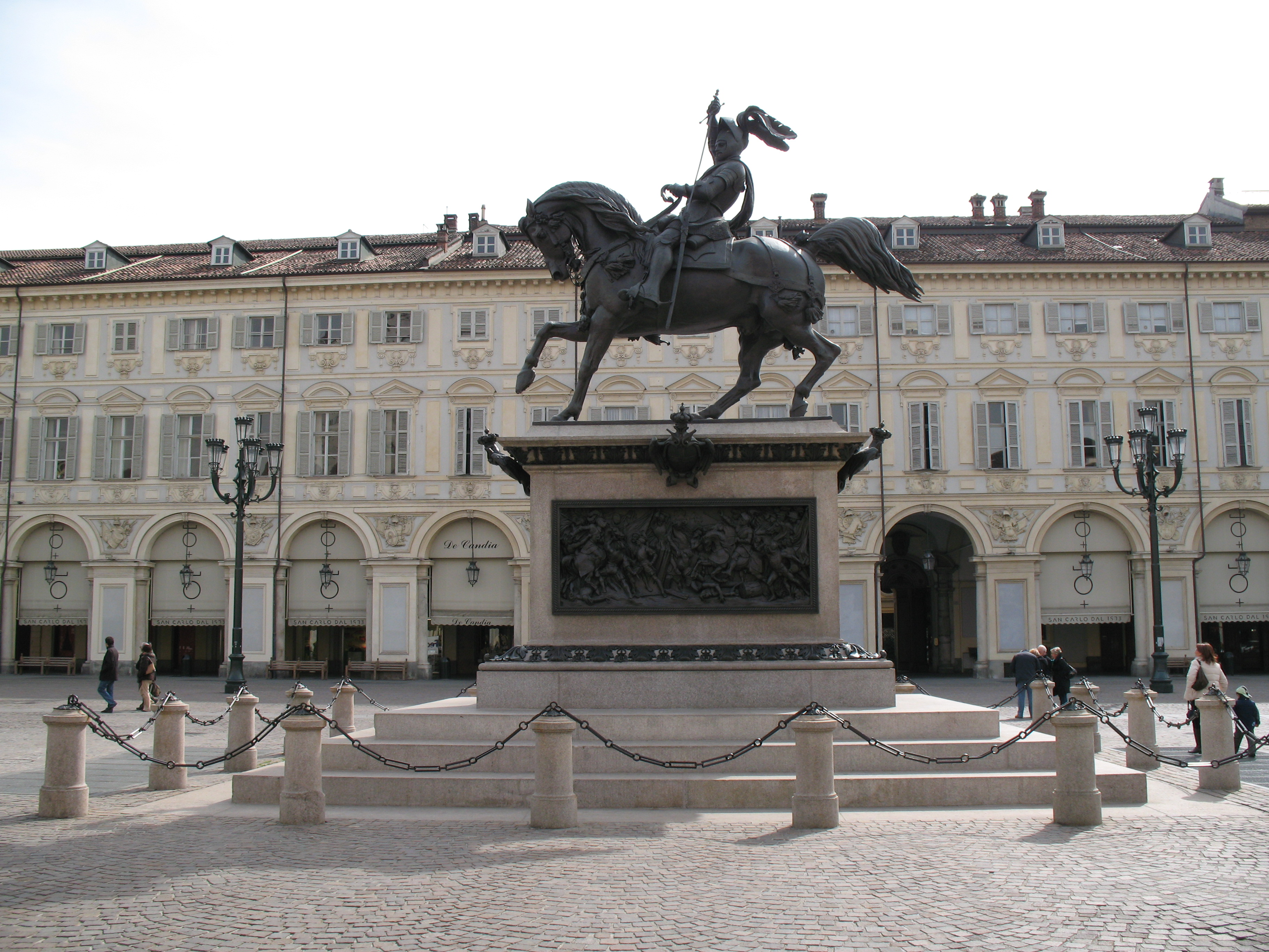 Statua equestre ad Emanuele Filiberto di Savoia - Piazza san Carlo - Torino - Italy